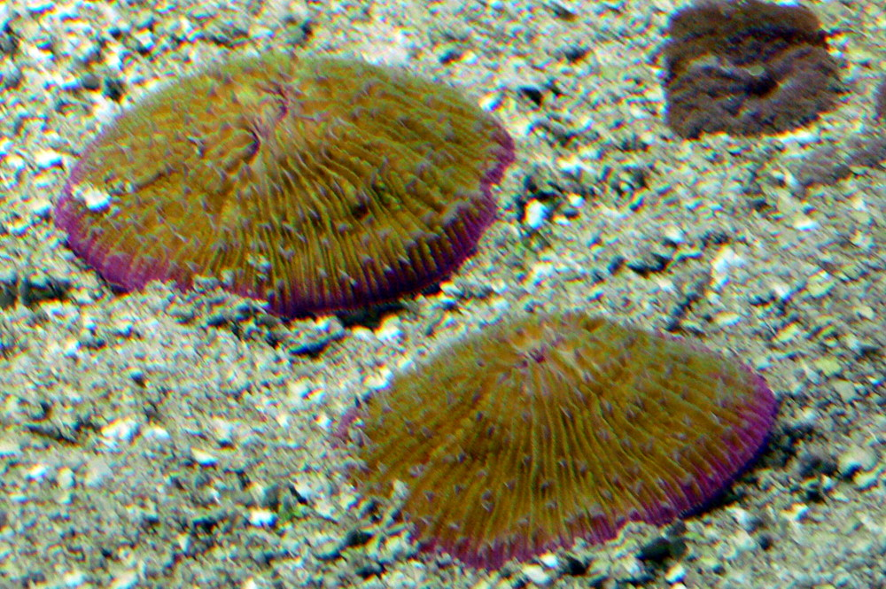 Fungia sp. taken at the Tierpark Berlin, Germany